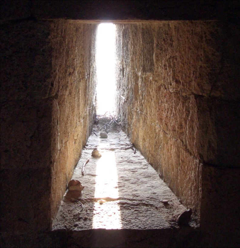 Beschreibung: Schießscharte in der Burgruine Rauheneck Fotograf: Michael Vogel Kamera: Casio Exilim EX-Z4 Aufnahmedatum: 7. Dezember 2004 Lizenz